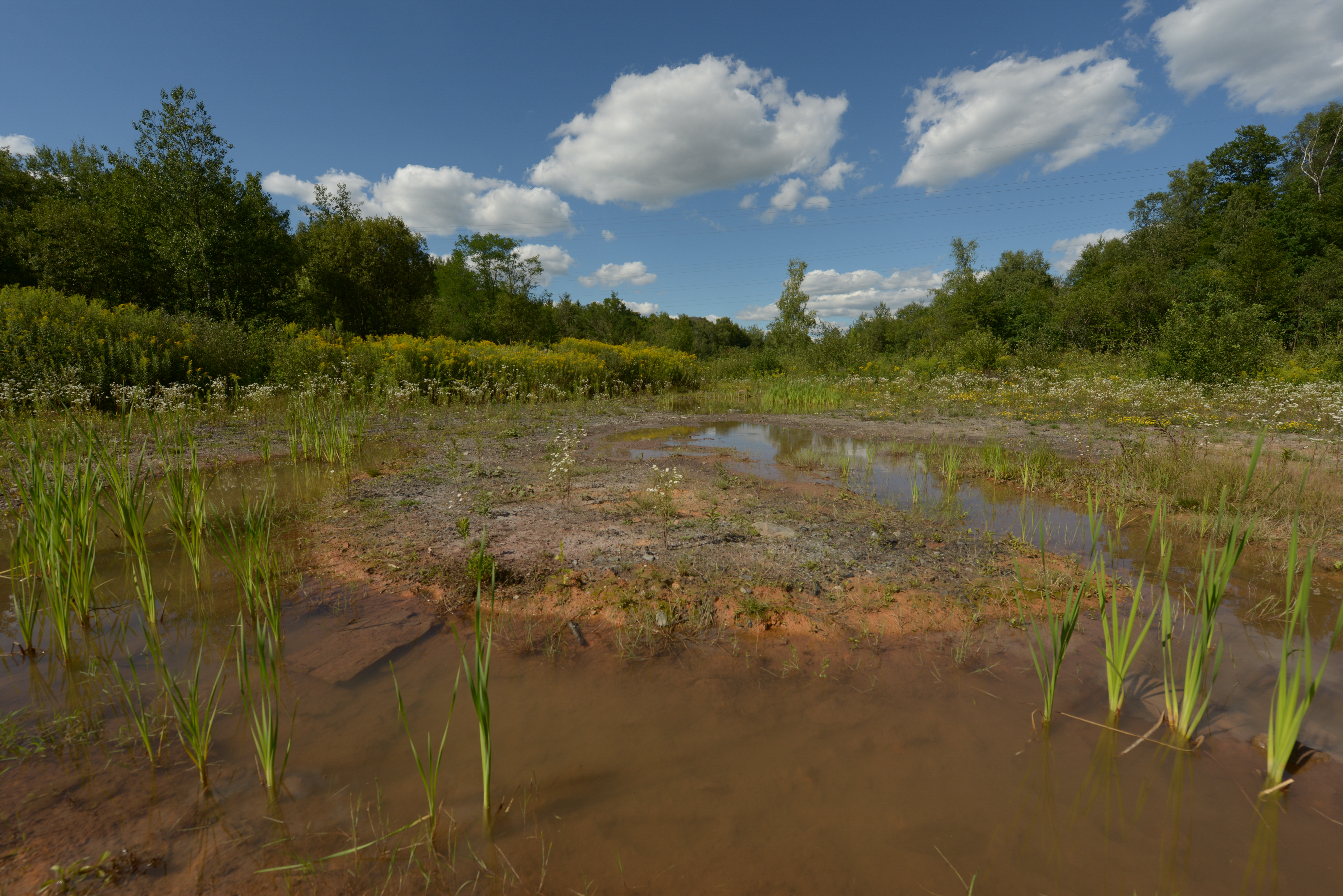 Angelegtes Kleingewässer im Weilerbachtal in Neunkirchen/ Saar südlich Weiher Nr. 5 im Landschaftslabor Berbaufolgelandschaft des Naturschutzgroßprojekts Landschaft der Industriekultur Nord (LIK.Nord).